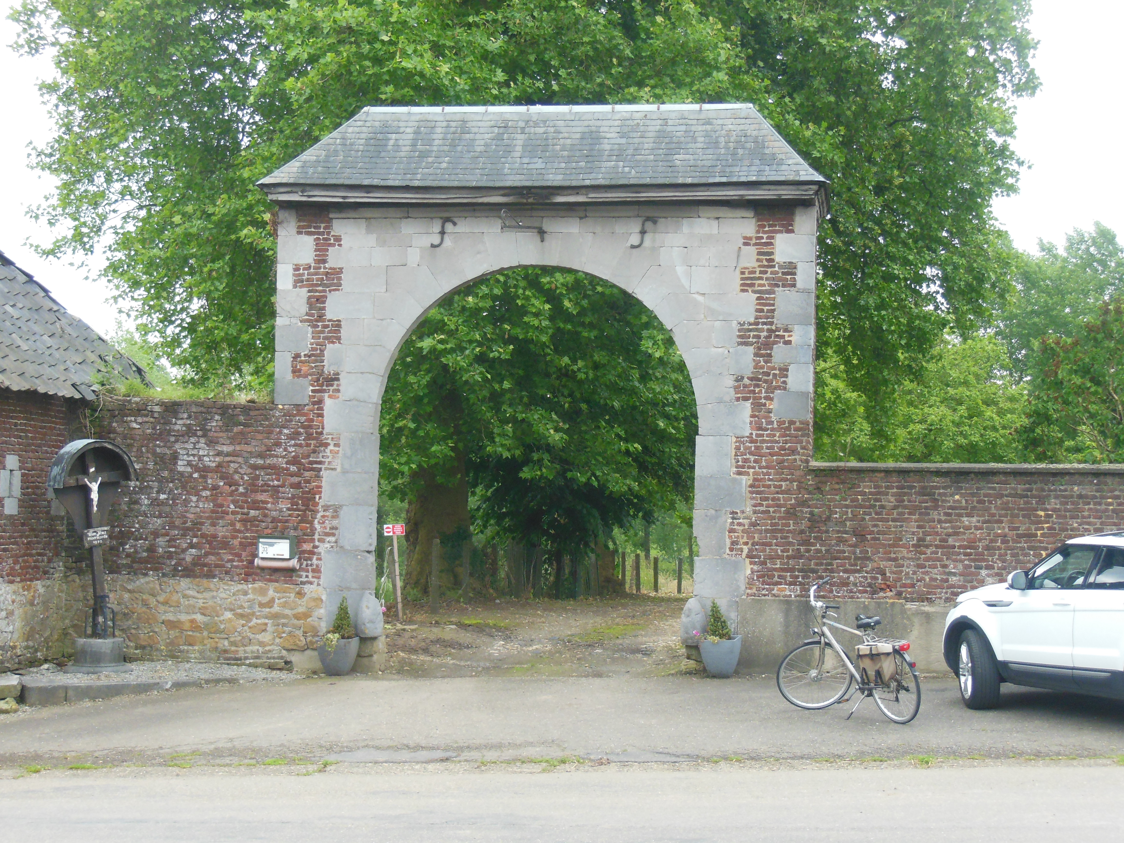 Poort van boerderij in Remersdaal